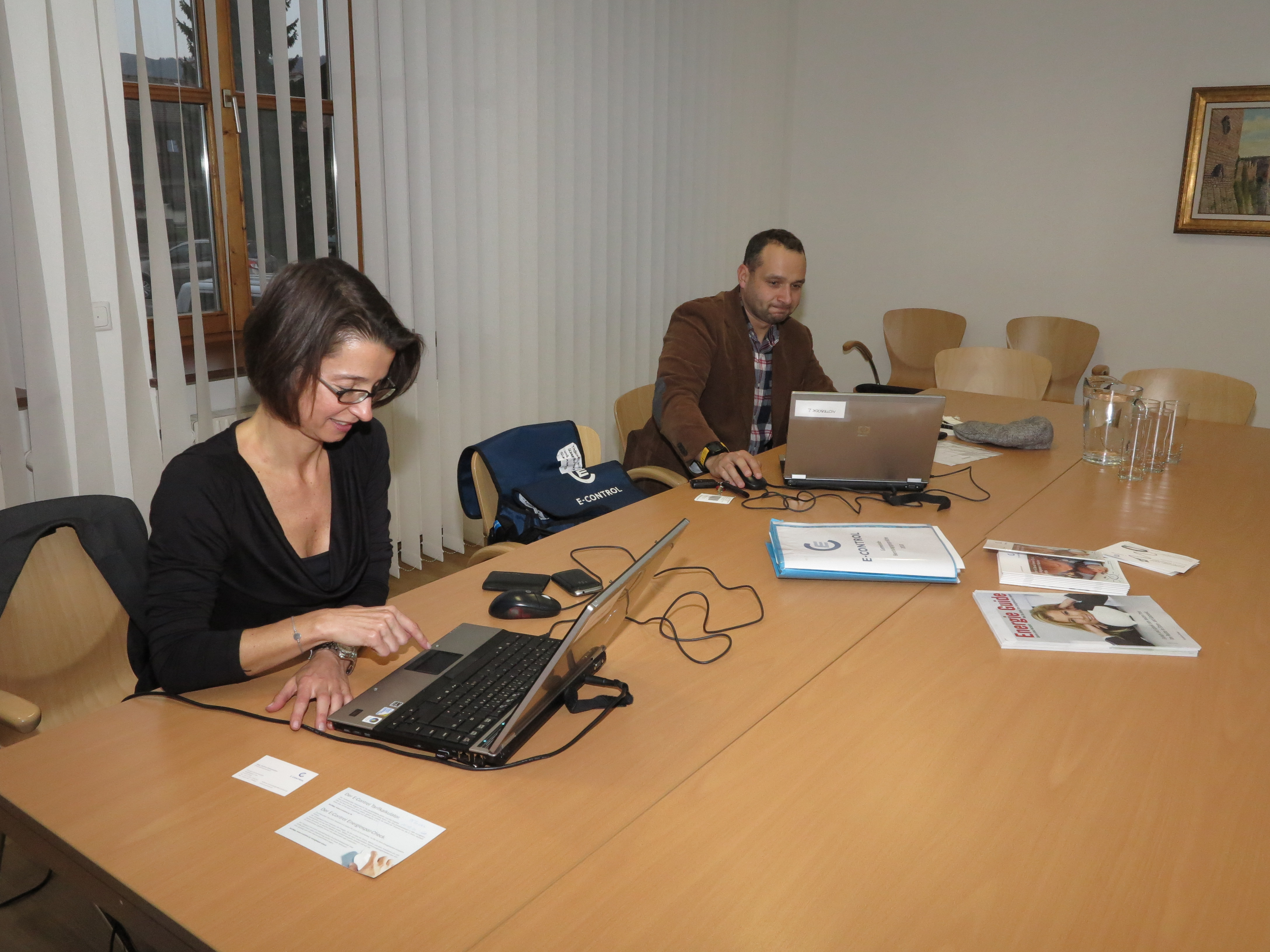 E-Control Bürger Beratung in den Räumen einer Tiroler Gemeinde.